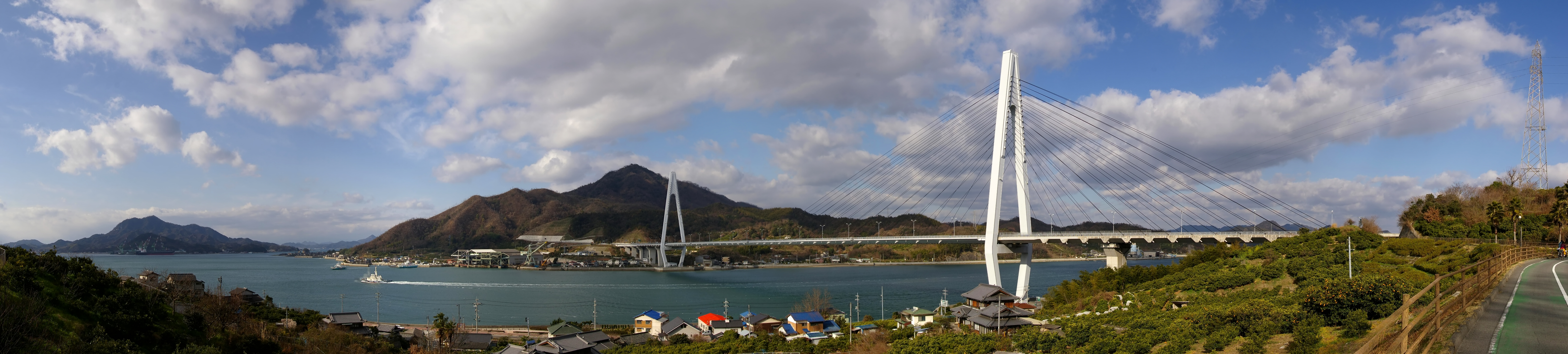 Ikuchi Bridge